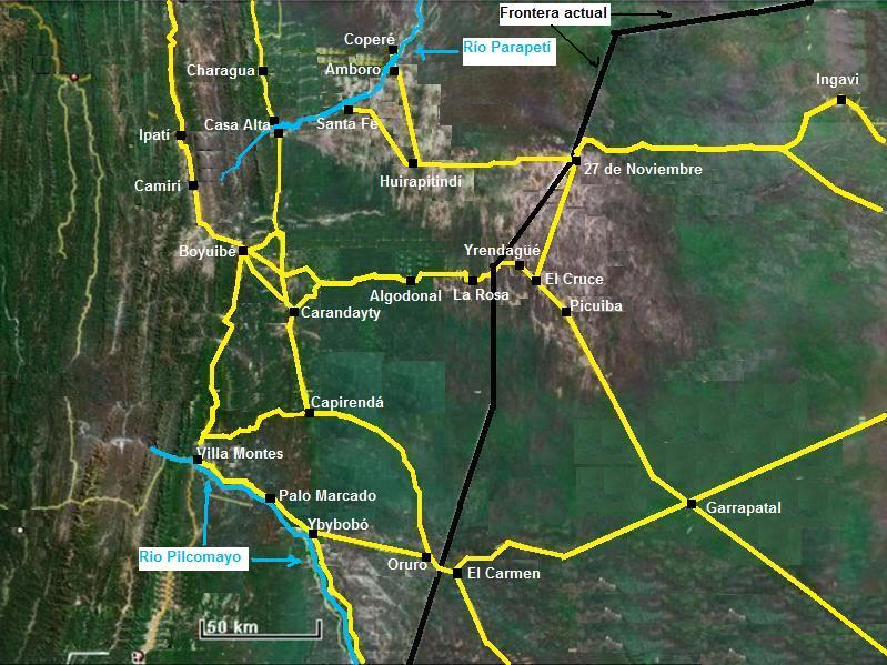 Guerra del Chaco. Teatro de operaciones enero a junio de 1935